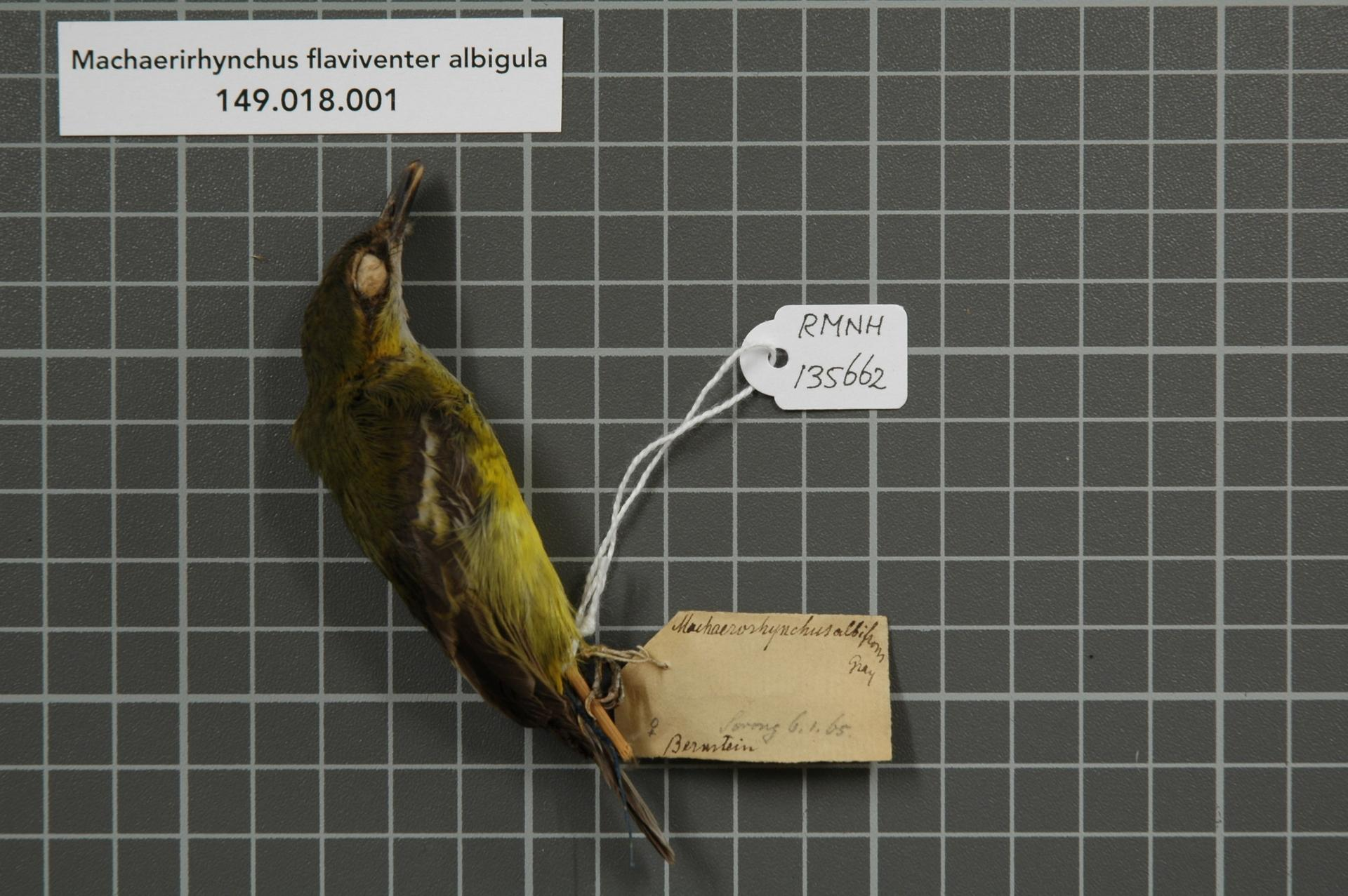 Machaerirhynchus flaviventer albigula Mayr & Meyer de Schauensee, 1939